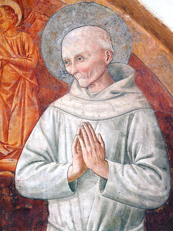 Benozzo Gozzoli, Fresco: Convento di San Fortunato (Montefalco) - Virgin and Child, detail